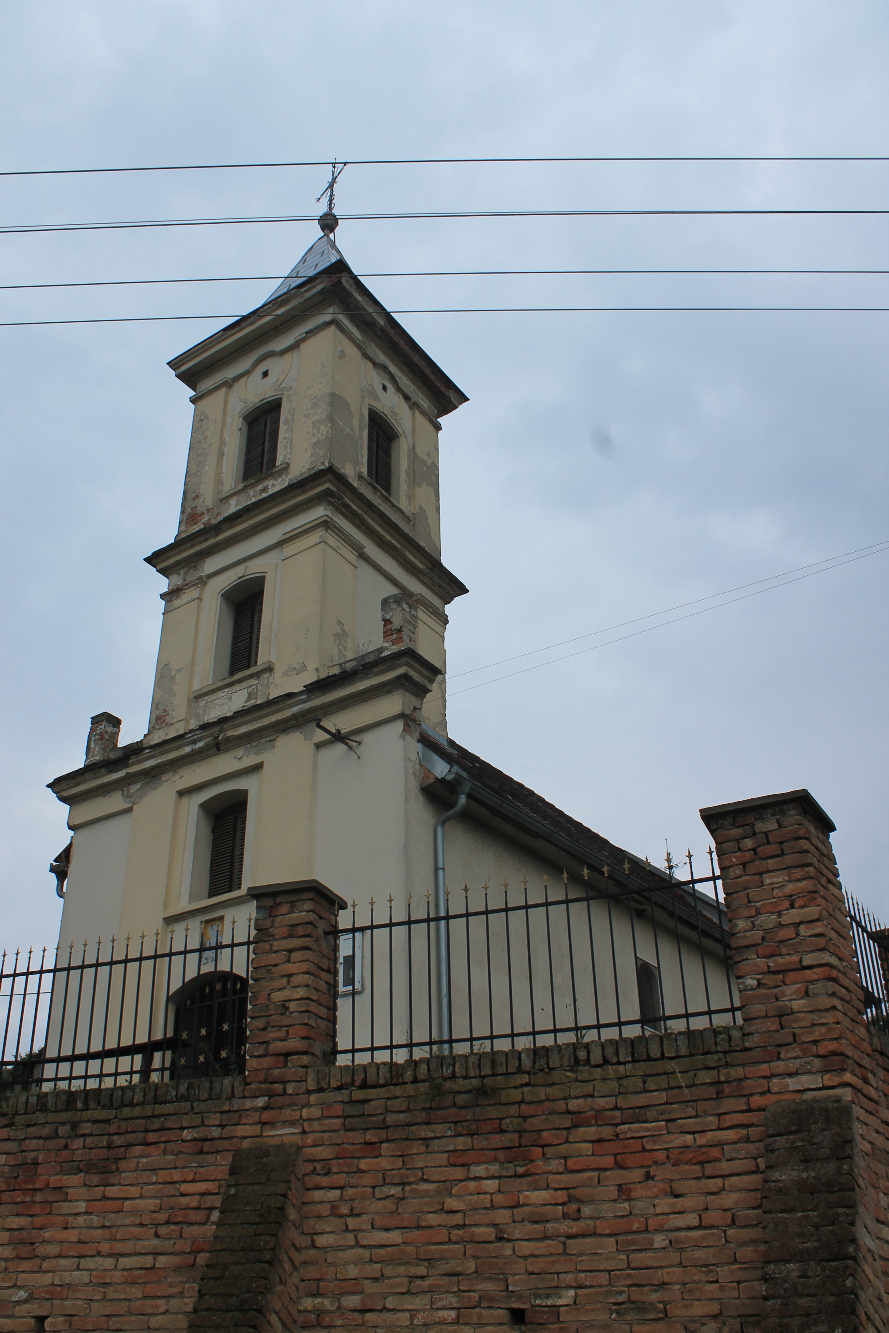 Crkva Sv. Gavrila (Molovin)